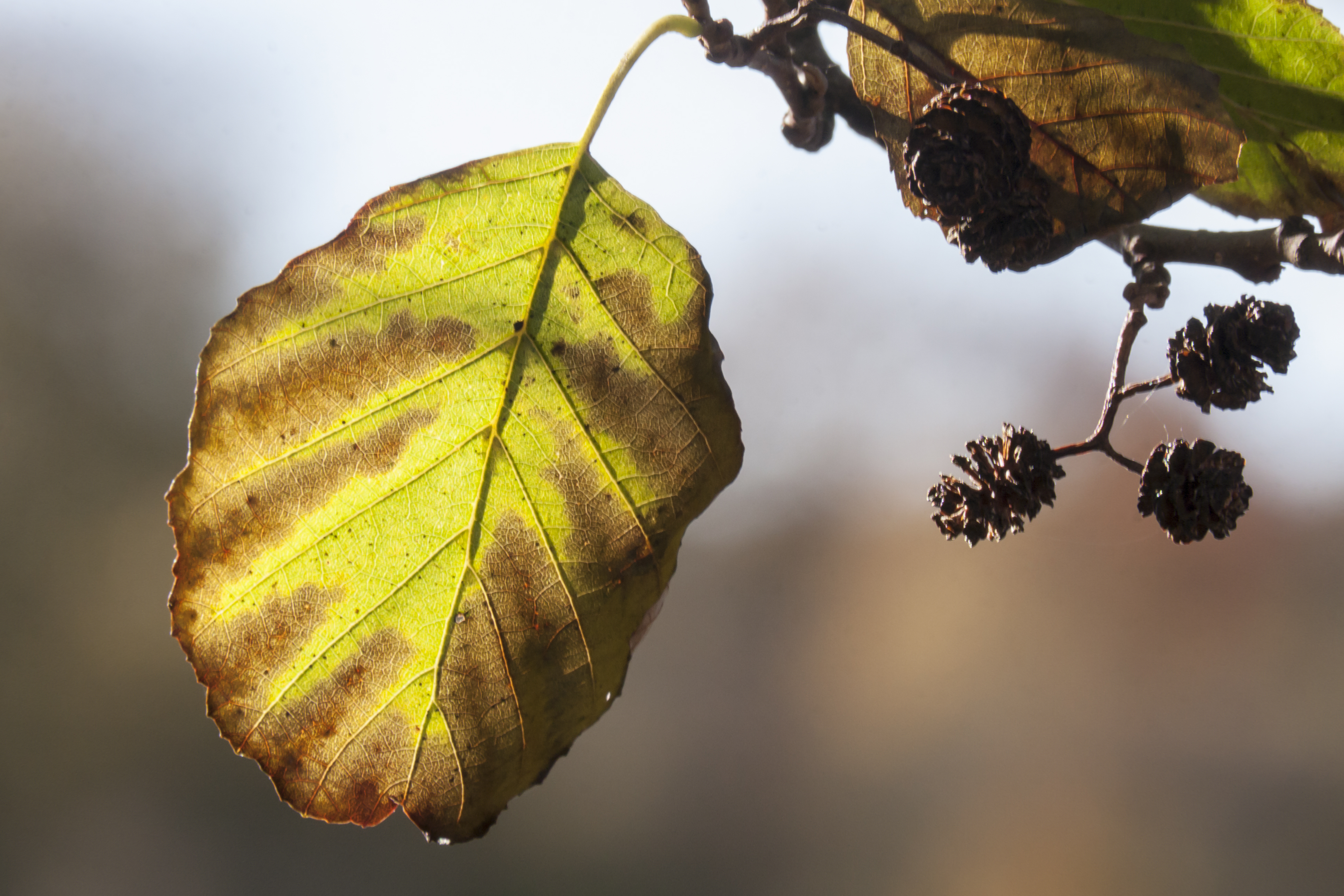 Höstlöv från klibbal.